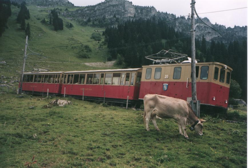 Ein Zug der Schynige Platte-Bahn auf Talfahrt.